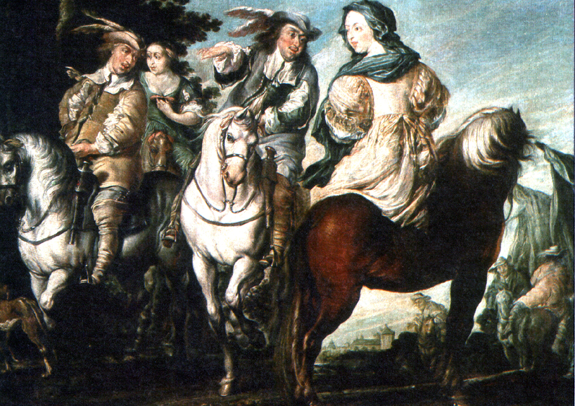 Jagdgesellschafttitle QS:P1476,de:"Jagdgesellschaft" label QS:Lde,"Jagdgesellschaft"